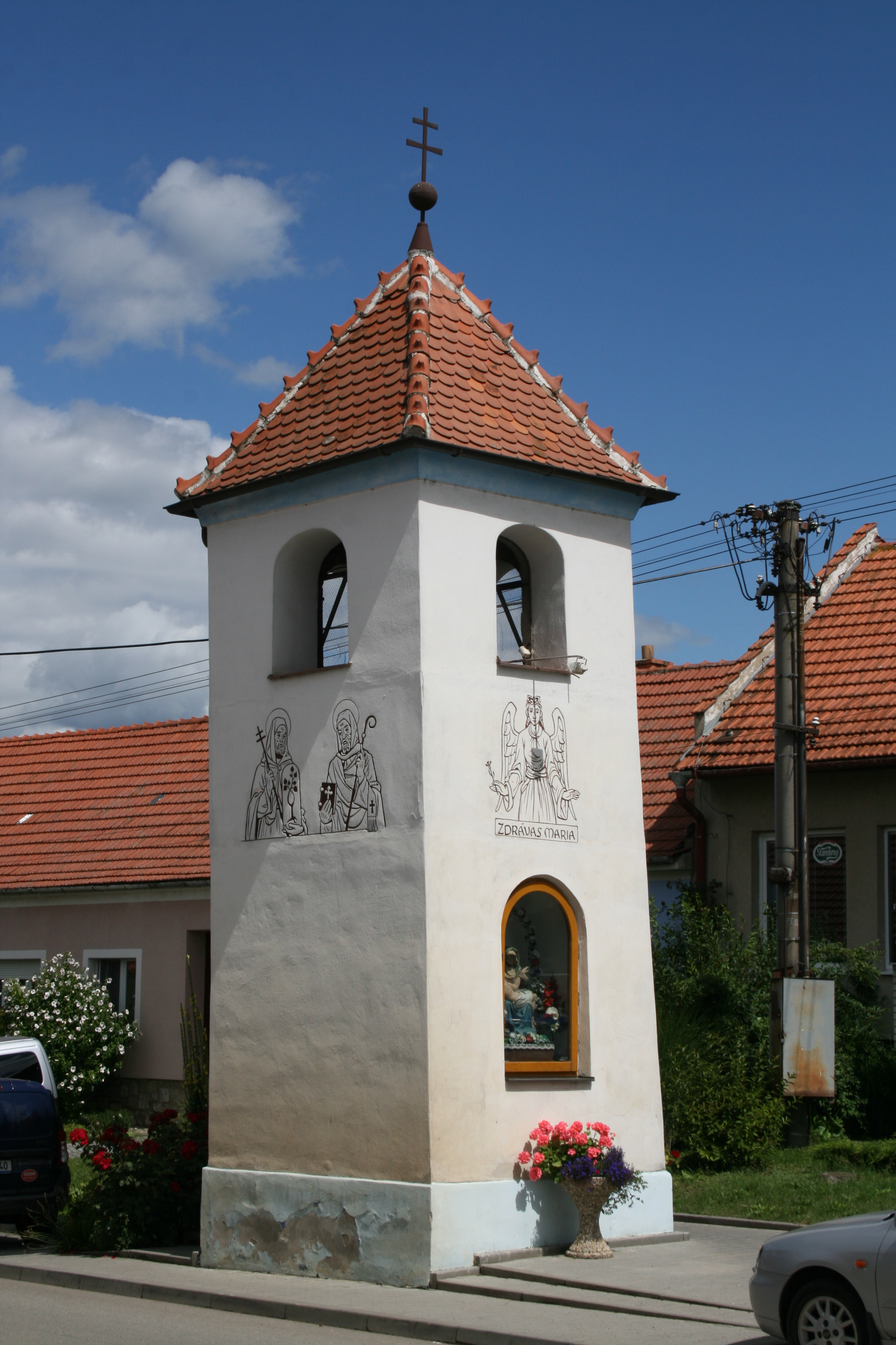 Zvonice na návsi v Jiříkovicích, okres Brno-venkov. Pohled od jihozápadu.